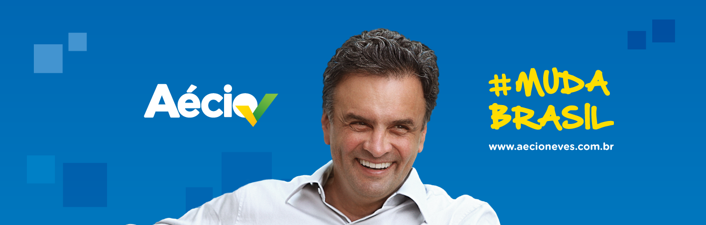 Banner de campanha de Aécio Neves presidente, a Muda Brasil.